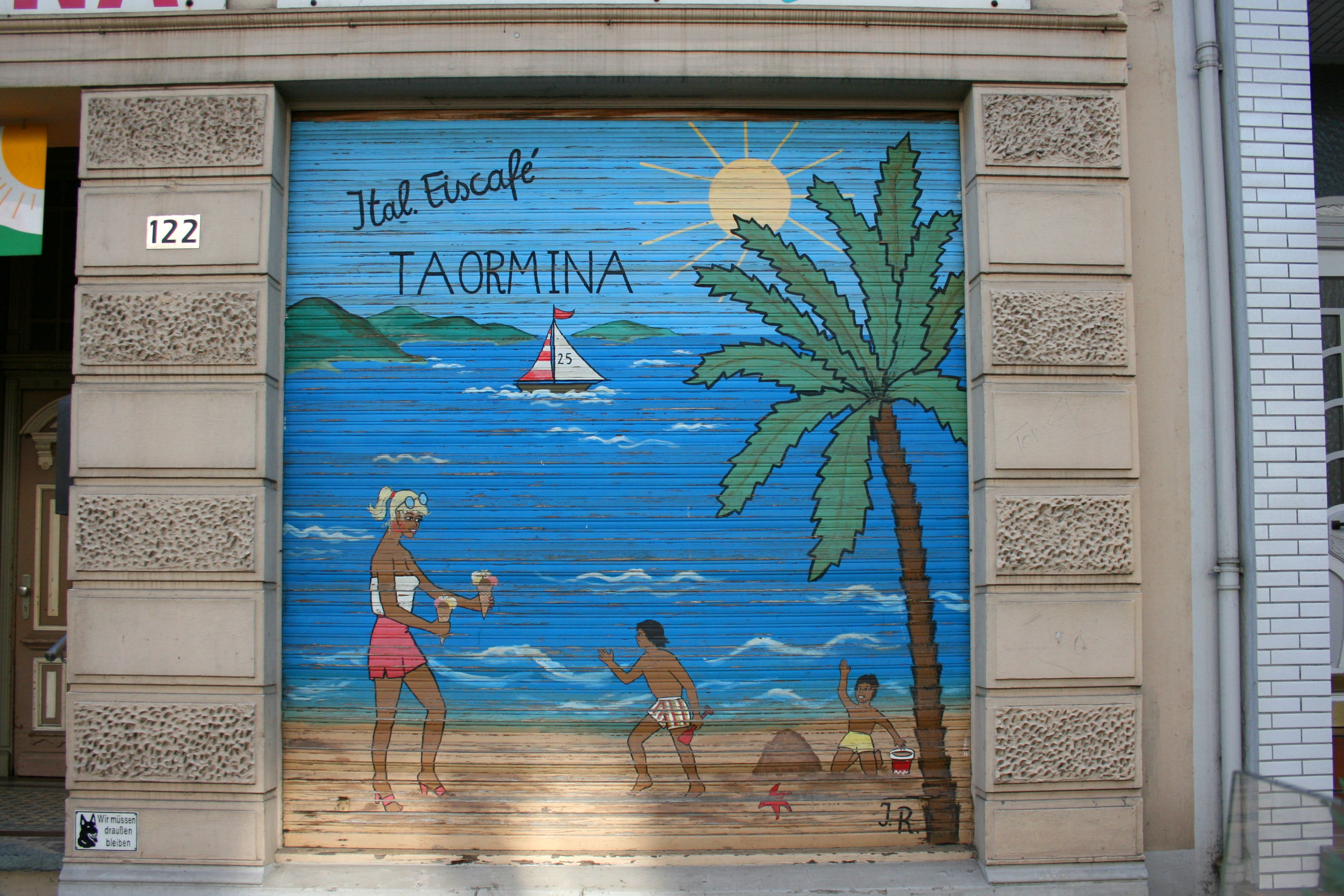 Kaiserstraße in Wuppertal-Vohwinkel. Die Bemalung existiert seit dem 11.10.2008 nicht mehr, ich hatte sie zufällig noch am letzten Tag vor dem Umbau des Cafés erwischt.